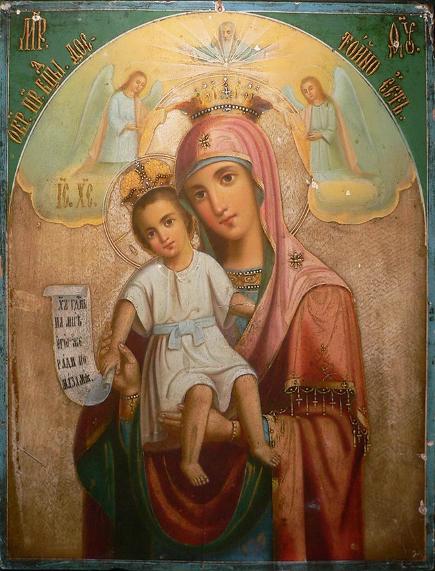 Достойно Есть. Икона афонского письма 19в.